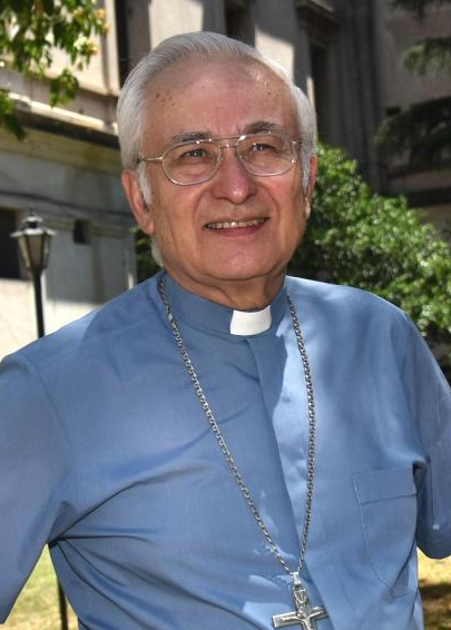 Arzobispo de Córdoba